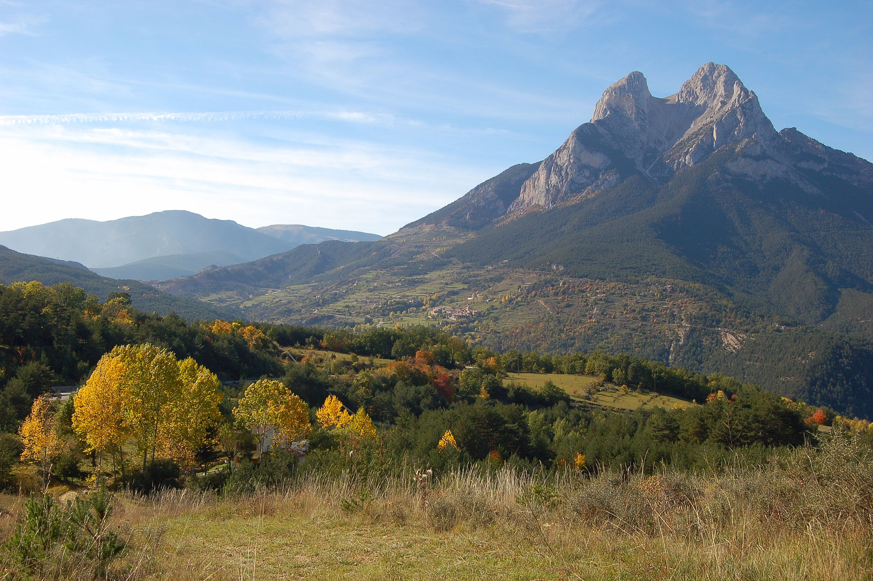 Pedraforca